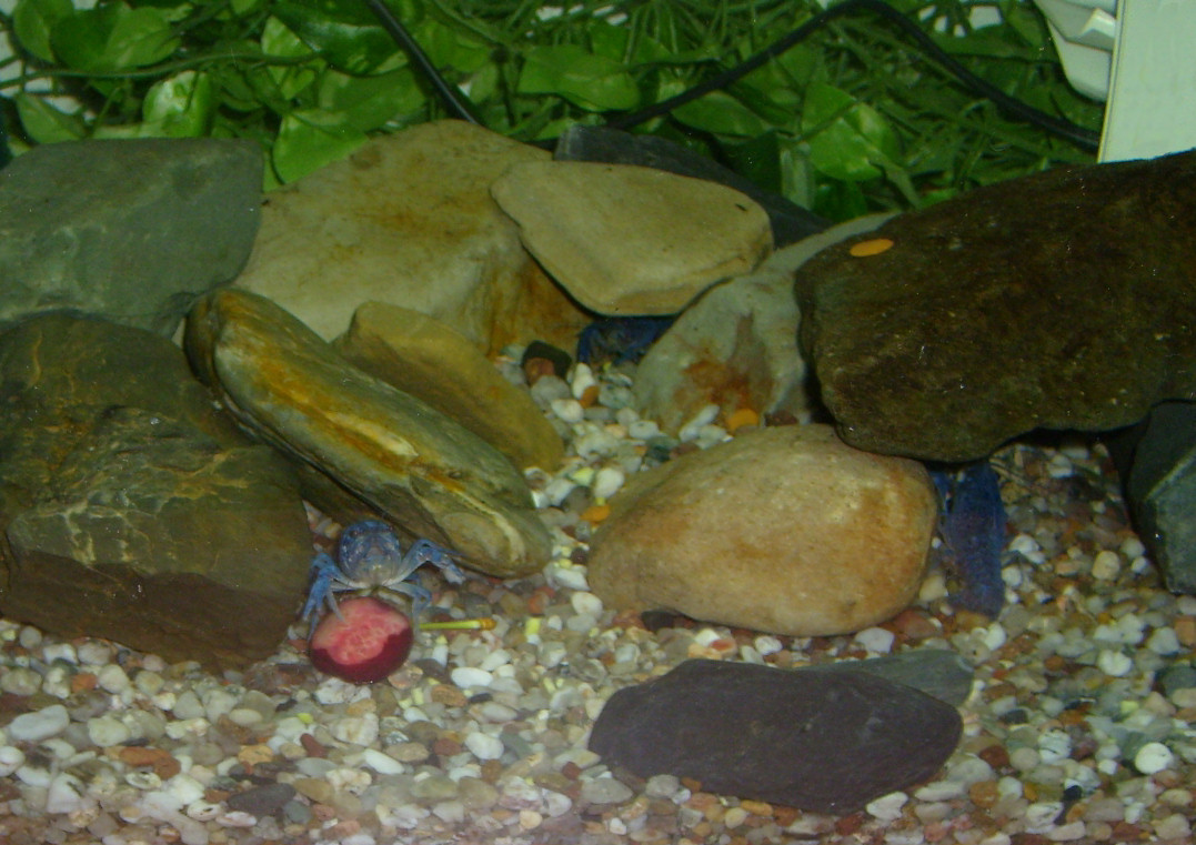 Procambarus alleni, blue form, 6 months old (Blauer Florida-Krebs, 6 Monate alt, mit Kirsche)